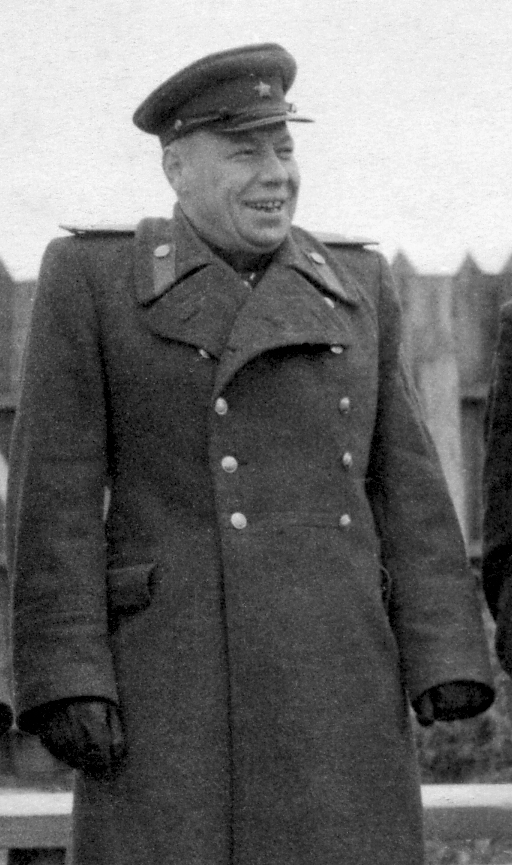 Фрагмент фотографии с сотрудниками лагеря